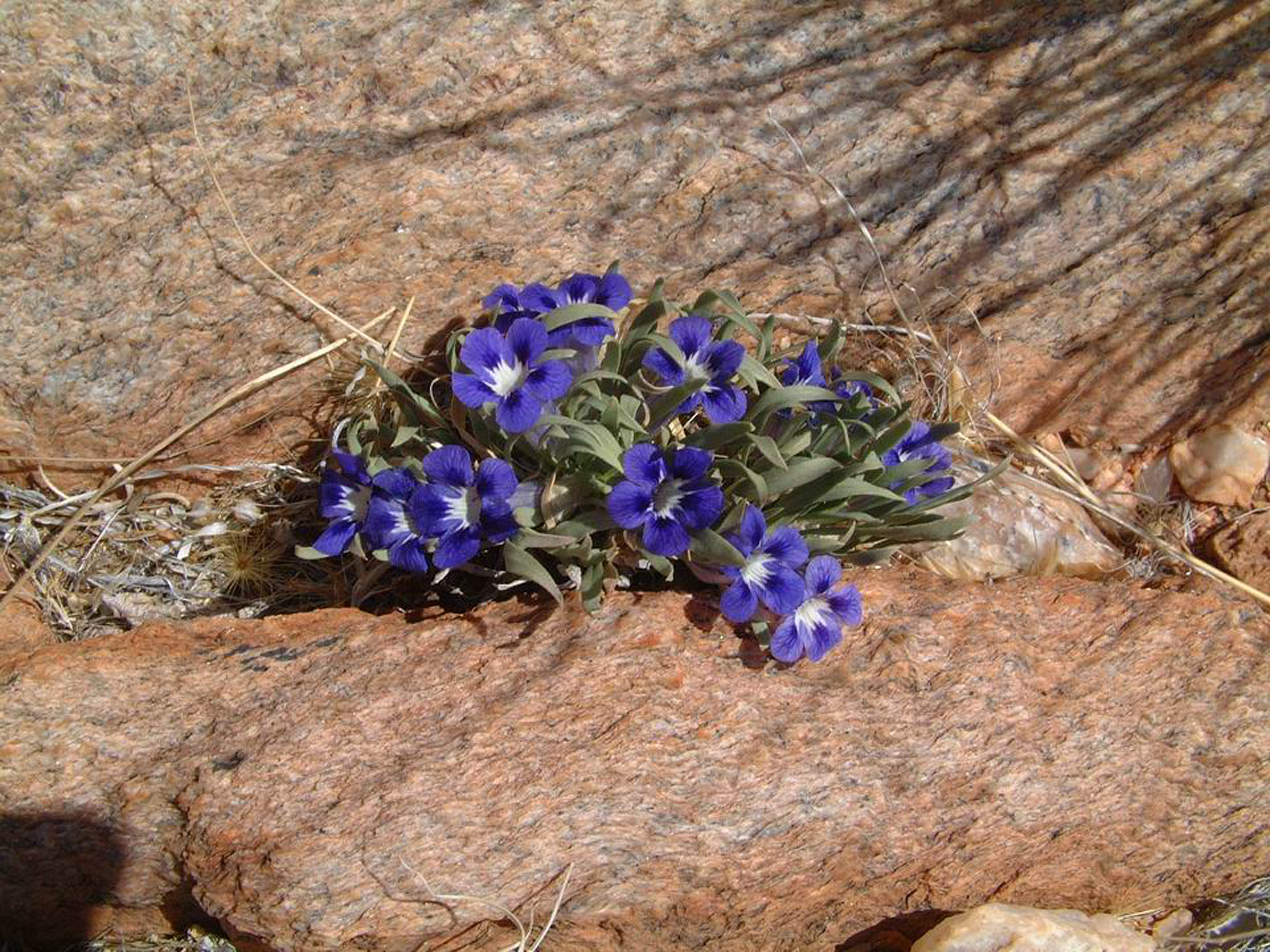 Aptosimum indivisum, 3km N. Pofadder, Afrique du Sud.